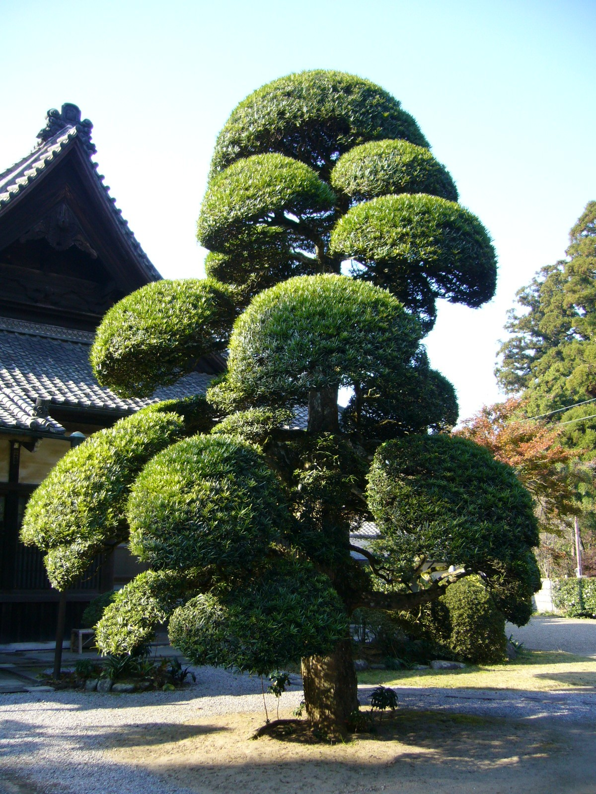 Podocarpus macrophyllus,katori-city,japan